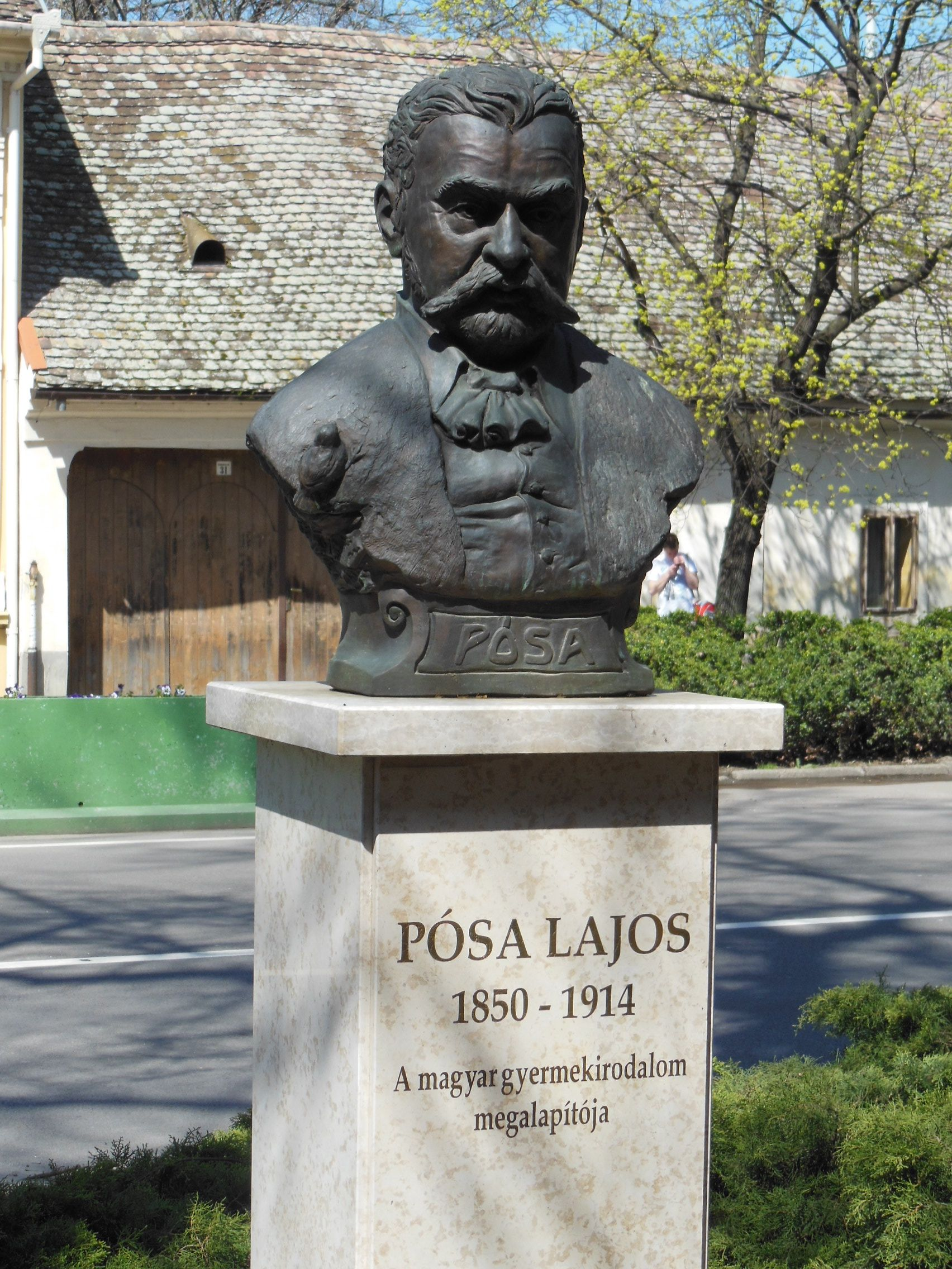 Pósa Lajos mellszobra Hódmezővásárhelyen (Andrássy u., Városi Könyvtár). Gábor Emese Anna 2010-es alkotása